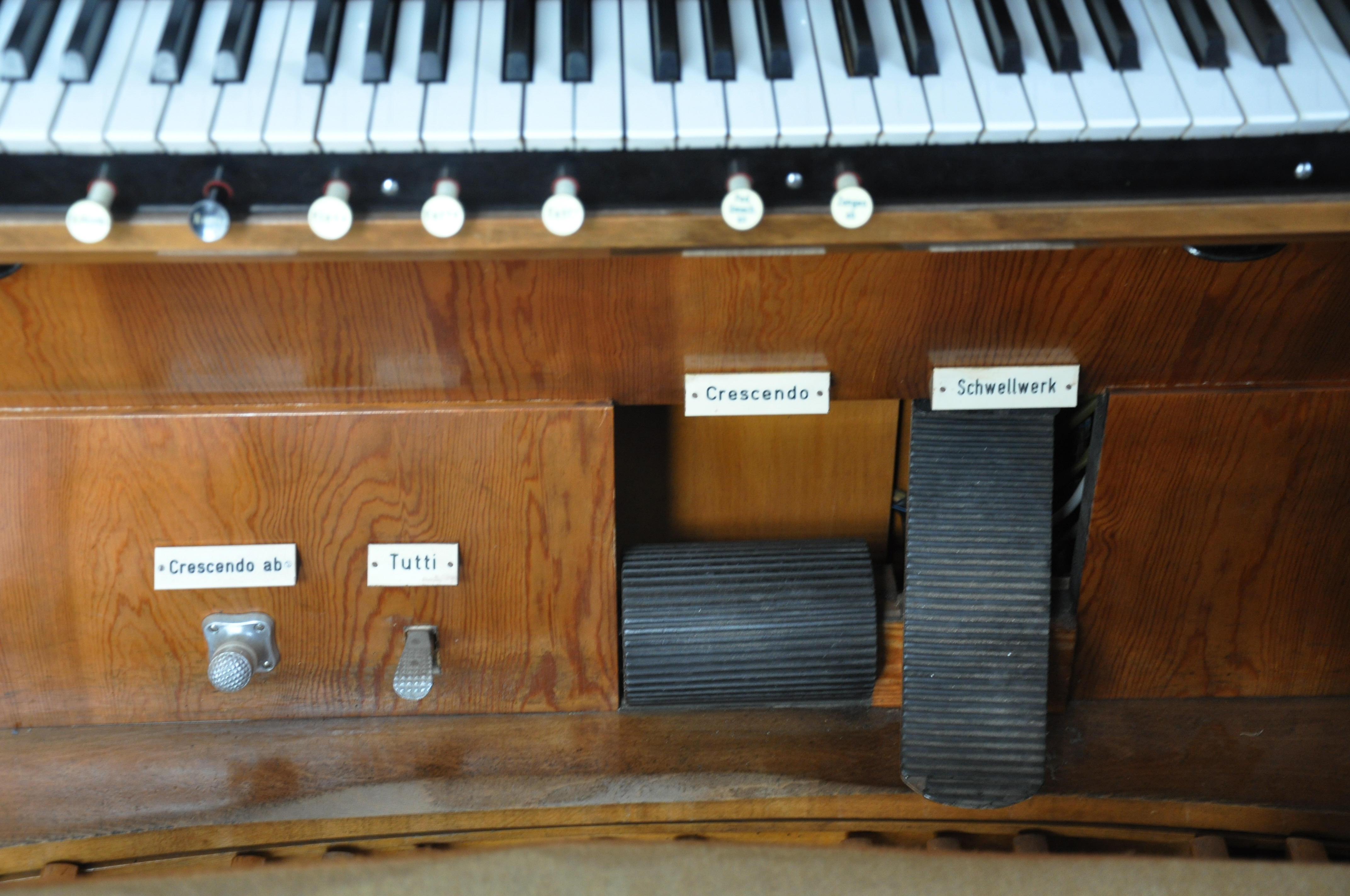 Bodnegg, Katholische Pfarrkirche St. Ulrich und Magnus, Spieltisch der Reiser-Orgel von 1954 (op. 256), links: Tritte für "Crescendo ab" und Tutti; rechts: Crescendowalze und Schweller